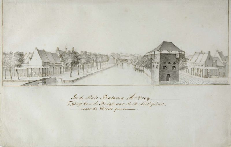 Tekening. Gezicht vanaf de brug bij het gebouw De Middelpunt naar de Diest poort. De Middelpunt was een blokhuis op de westelijke oever van de Kali Besar, opgetrokken van steen en heeft twee verdiepingen. Het gebouw herbergt acht kanonnen en twintig soldaten, twee of drie korporaals en een sergeant.. De stad Batavia in 1709